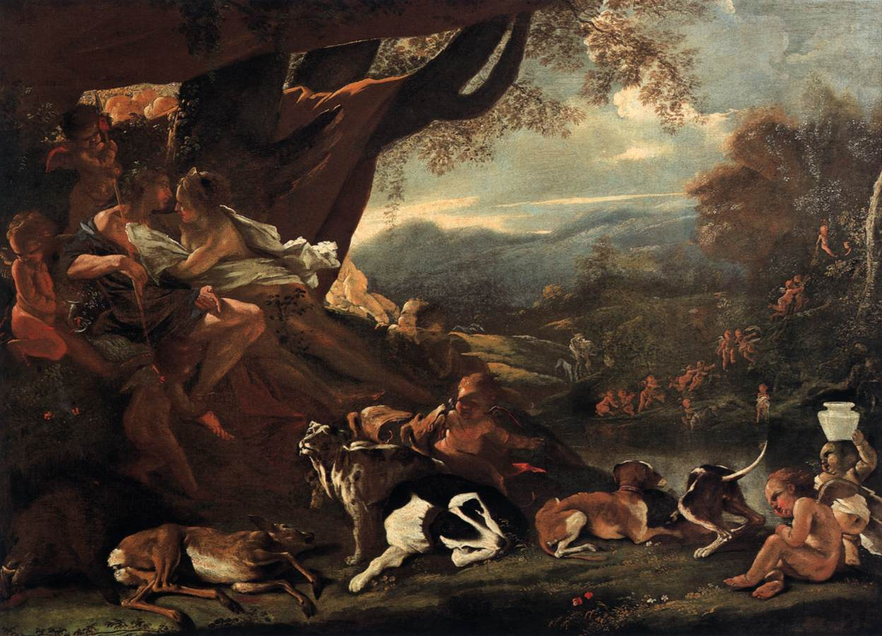 Pietro Testa -Venere e Adone olio su tela 98 x 133 cm - 1635 Vienna